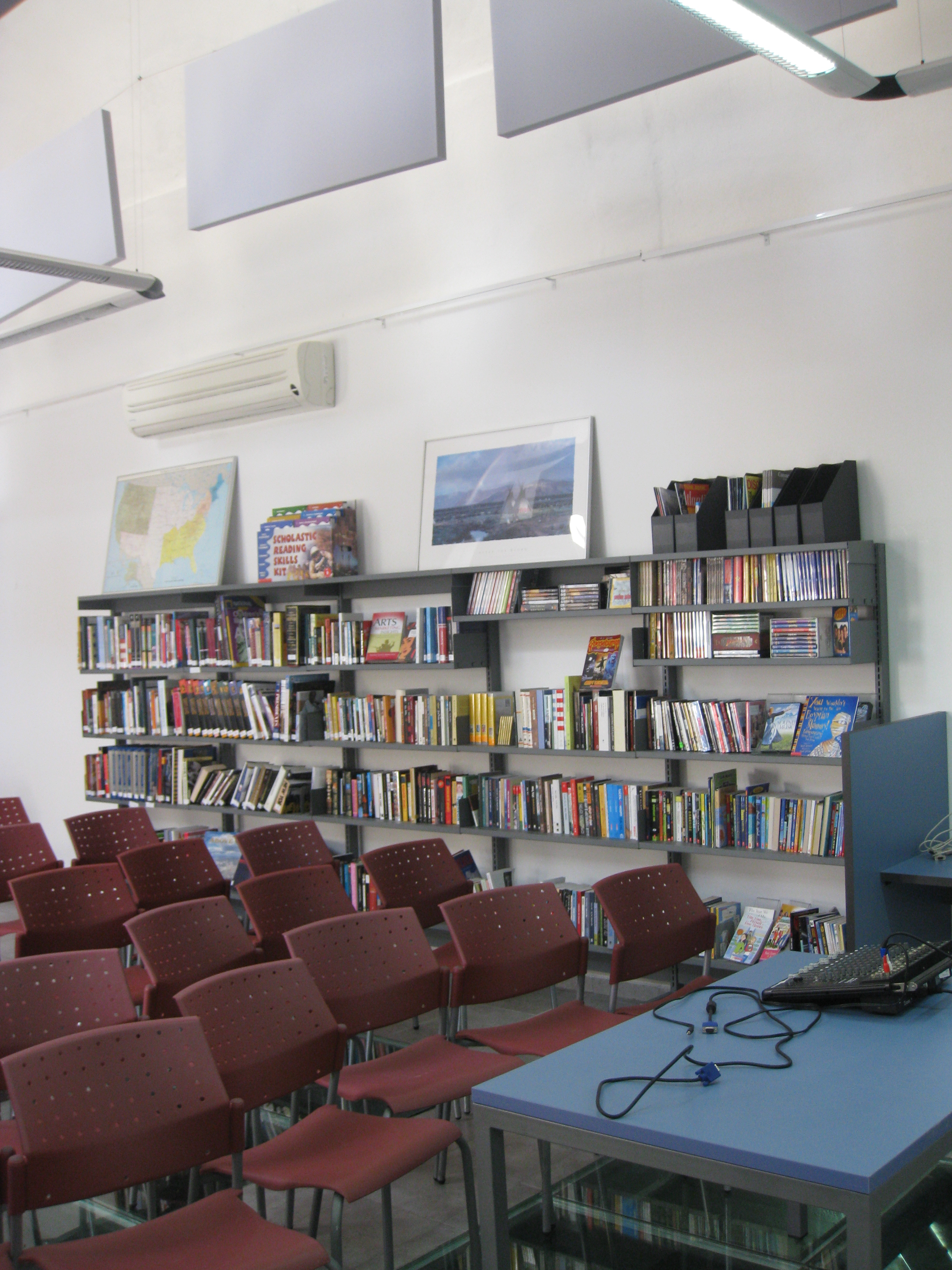 Acco (Acre, Akko) - Akko Saray Building. Today - a caltural centre עכו בית הסאריה של עכו. כיום מרכז תרבות.